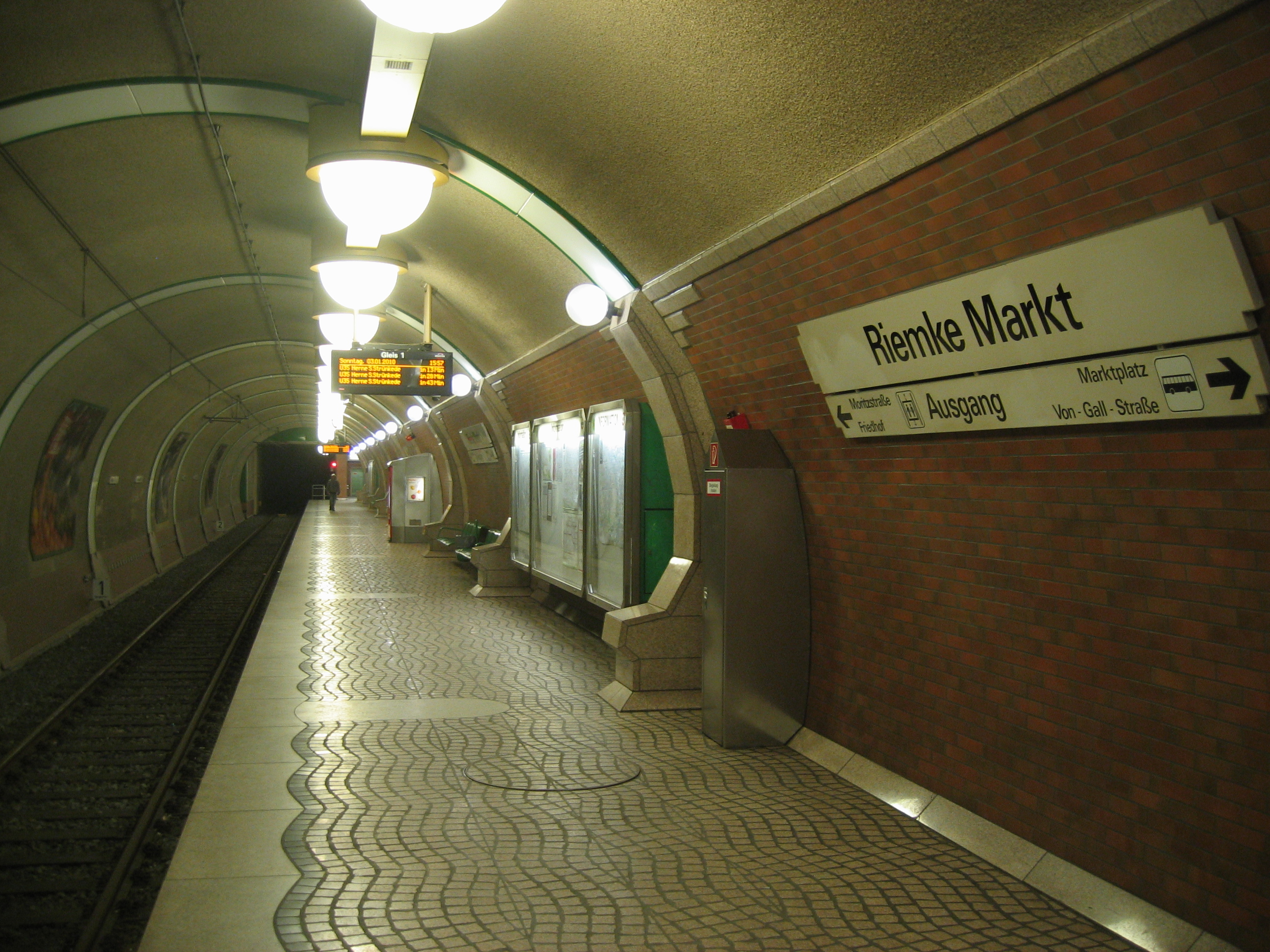 U-Bahnhof Riemke Markt der Stadtbahn Bochum